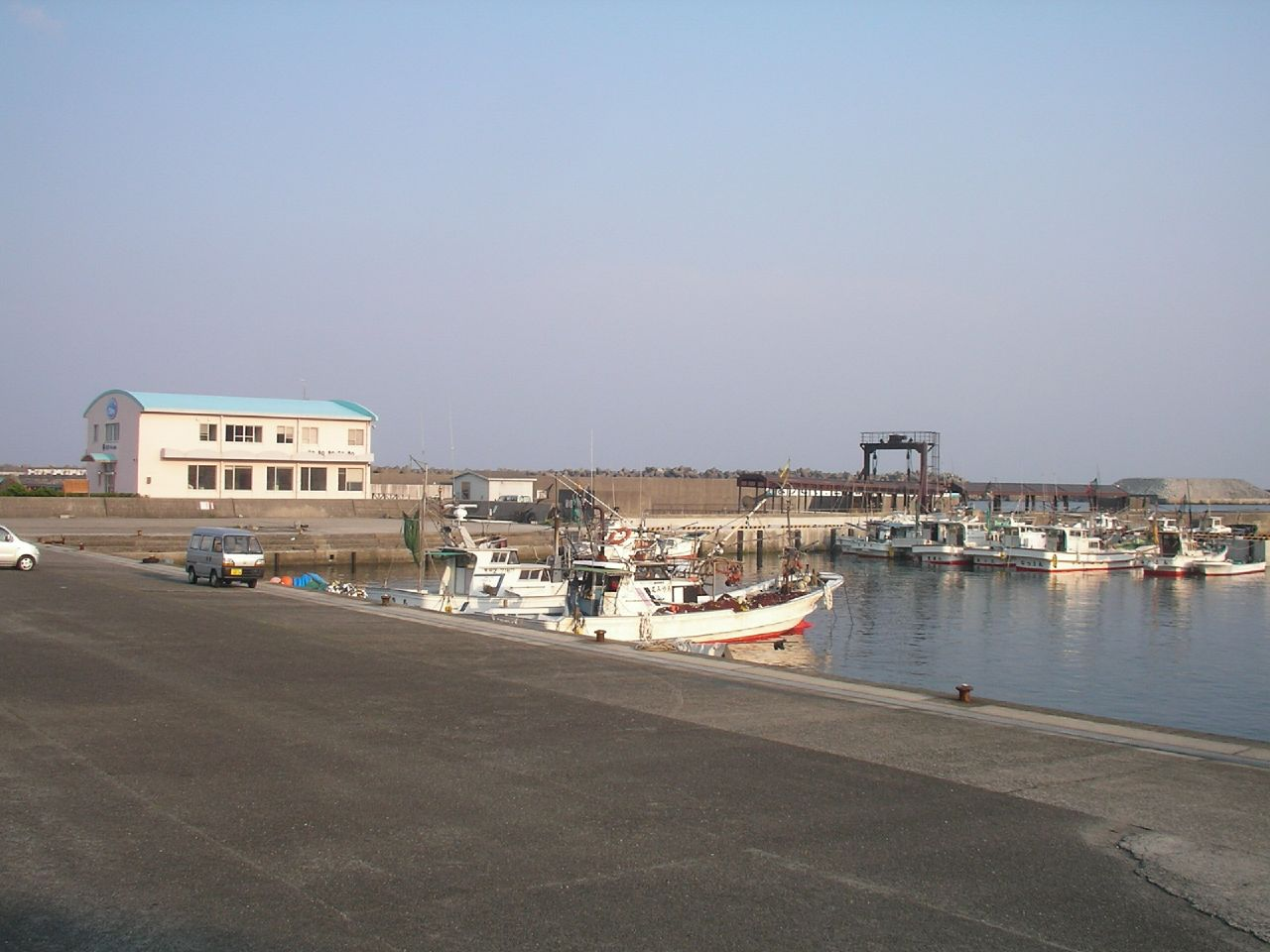 屋久島 安房港